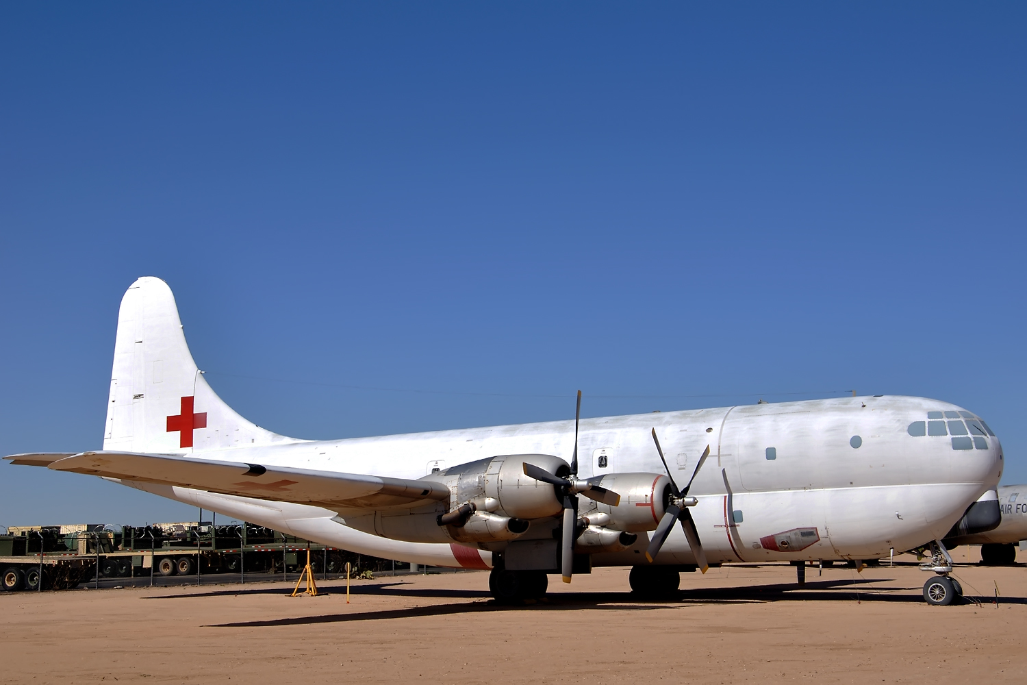 HB-ILY Boeing C-97G Stratofreighter